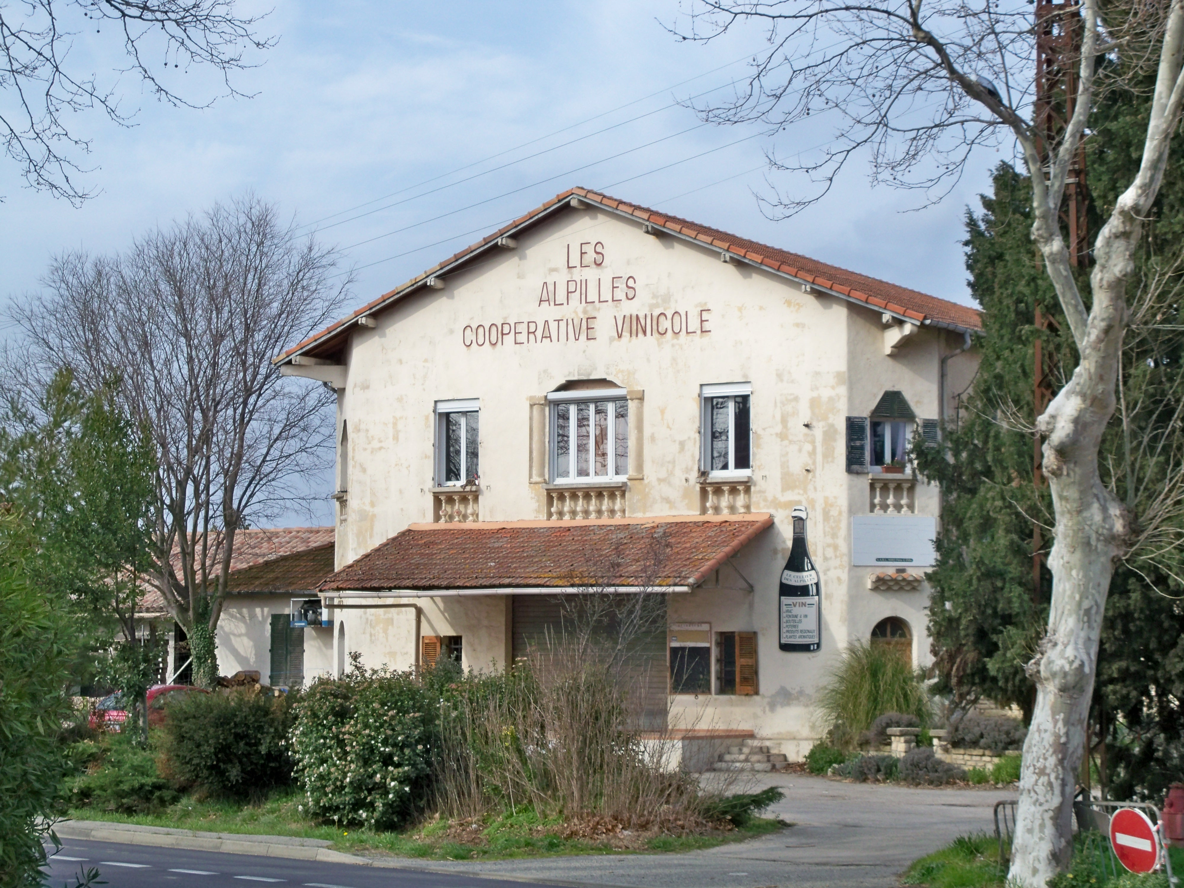 Cave coopérative vinicole des Alpilles à Saint Etienne du Grès (13), France